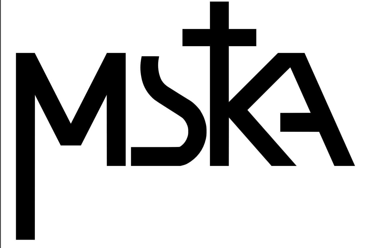 Oficiální tiskové logo Moravsko-slezské křesťanské akademie. Dílo je dostupné na základě schválení uveřejněného na webu